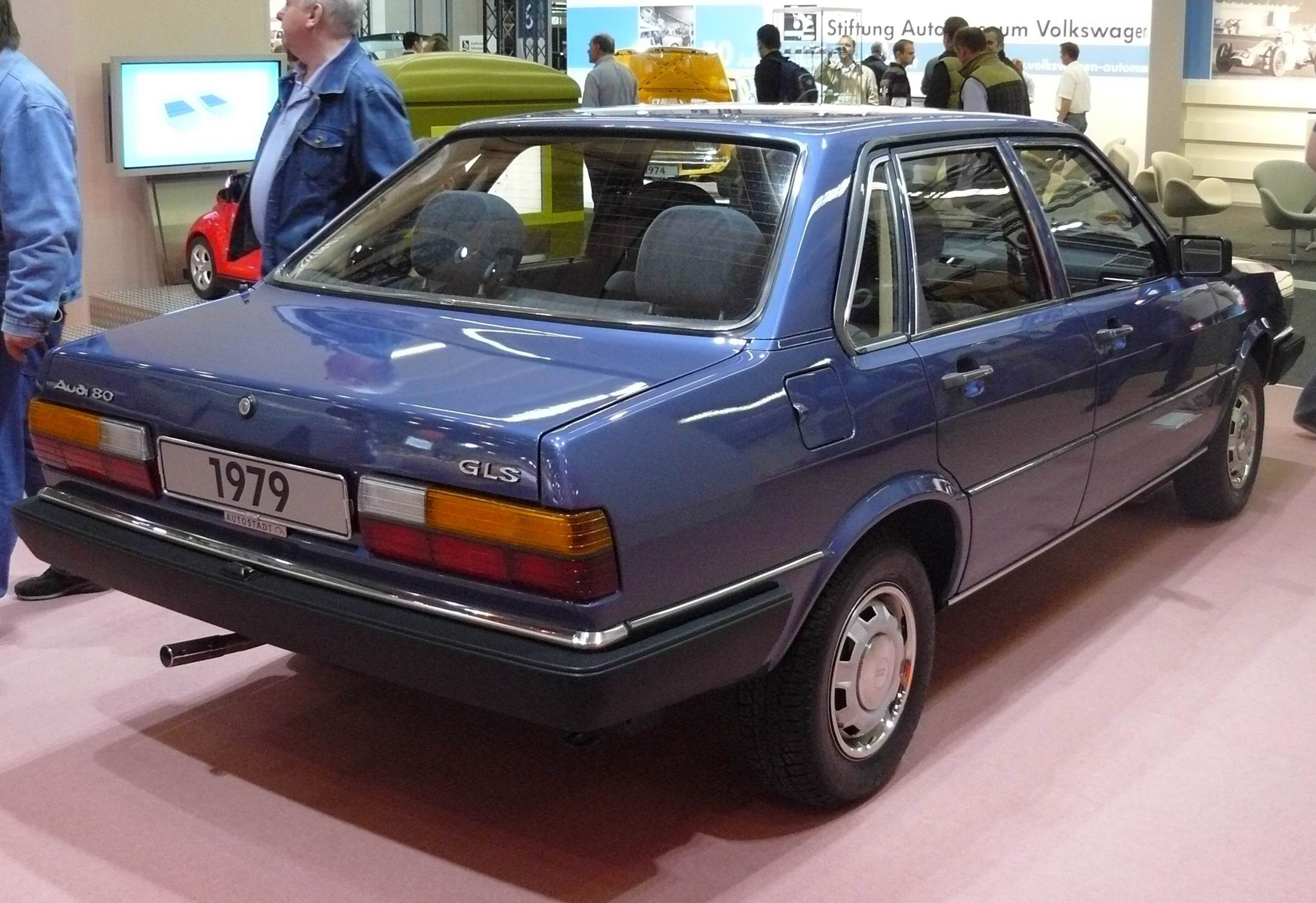 Essen 2011